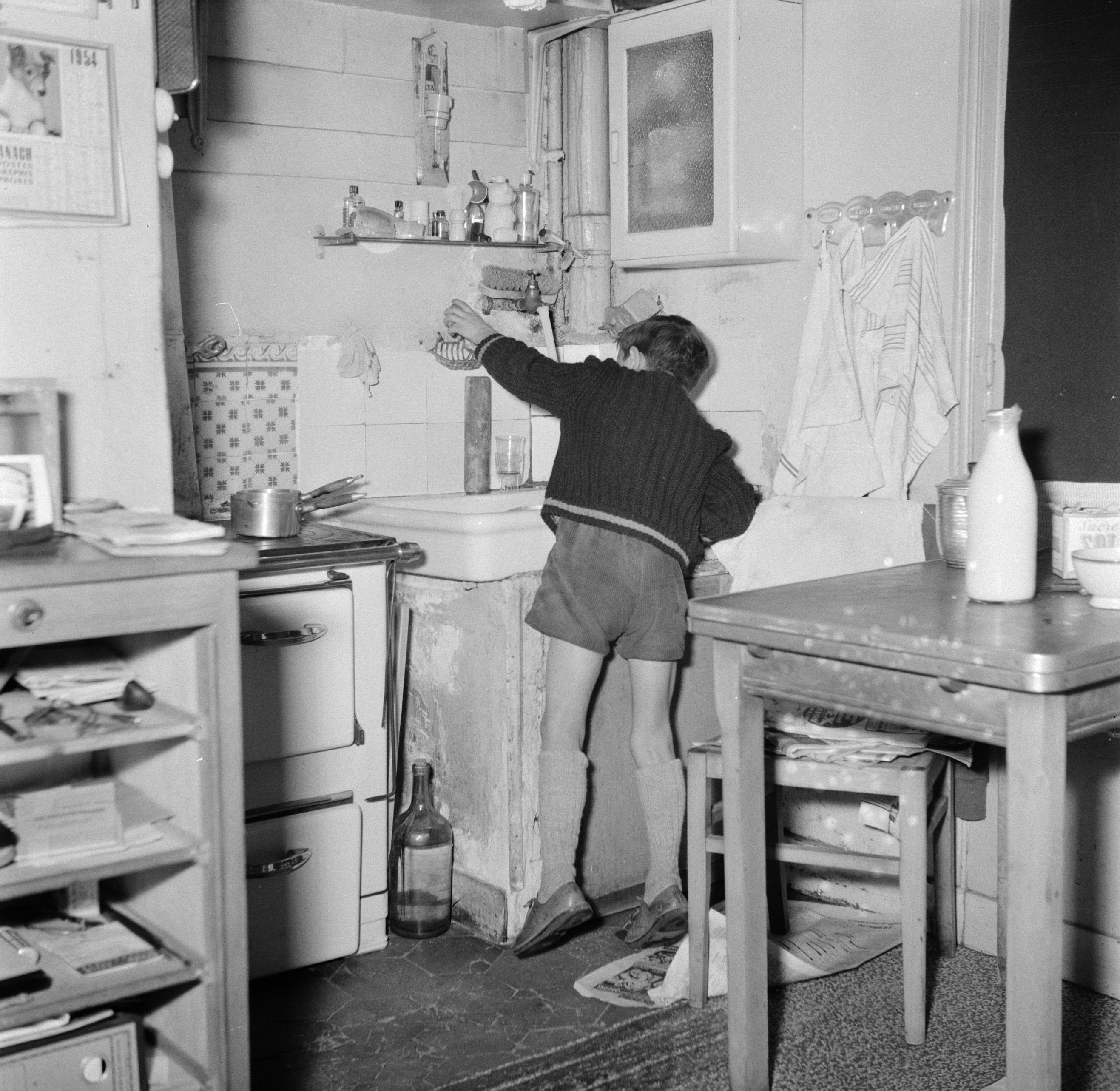 Collectie / Archief : Fotocollectie Van de Poll Reportage / Serie : De dagelijkse werkzaamheden van een conciërge in een Parijs' appartementengebouw Beschrijving : Het zoontje van de conciërge draait de kraan open Datum : 1954 Locatie : Frankrijk, Parijs Trefwoorden : interieur, keukens, kinderen, kranen Fotograaf : Poll, Willem van de Auteursrechthebbende : Nationaal Archief Materiaalsoort : Negatief (zwart/wit) Nummer archiefinventaris : bekijk toegang 2.24.14.02 Bestanddeelnummer : 252-9321